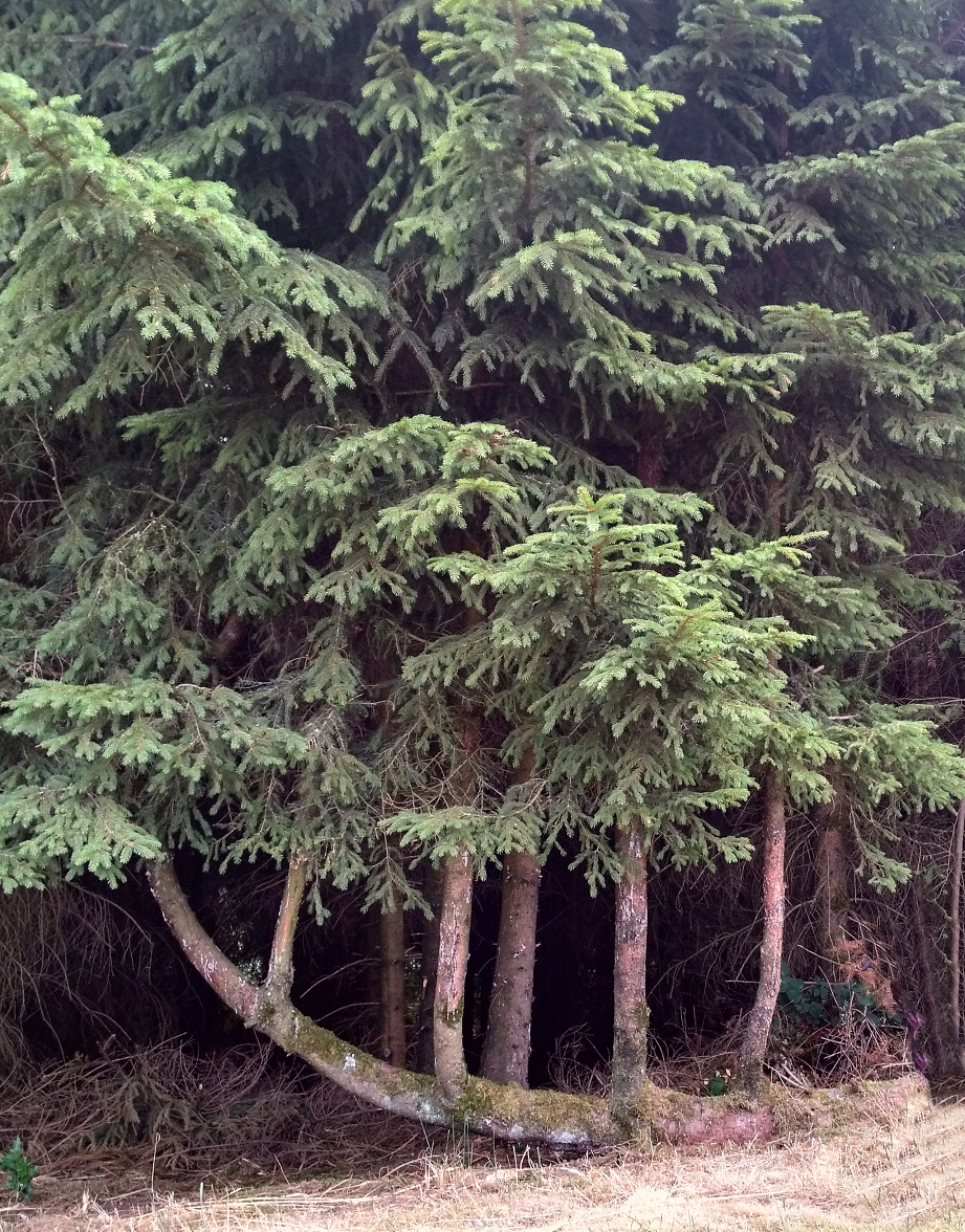 Harfenfichte Ober dem Hofe in Ohl, eine Fichte deren Hauptstamm waagerecht bogenförmig nach oben verläuft und Äste senkrecht nach oben, wie die Saiten einer Harfe